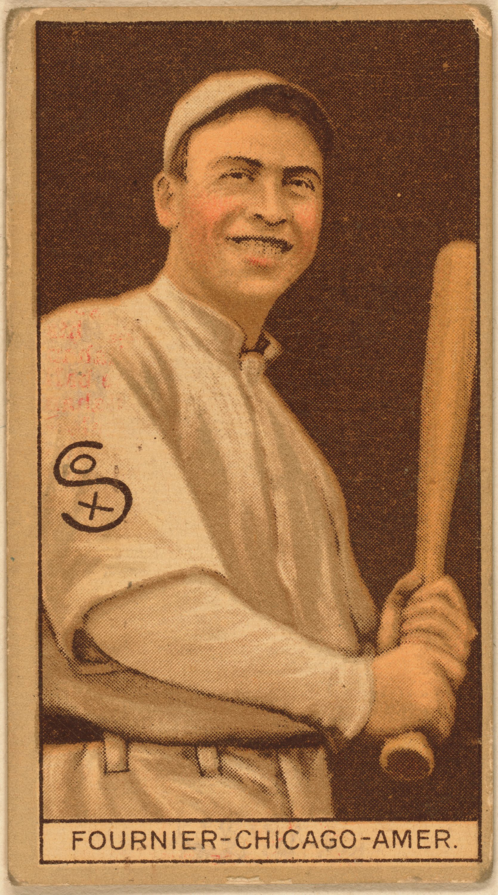 Jaques Fournier